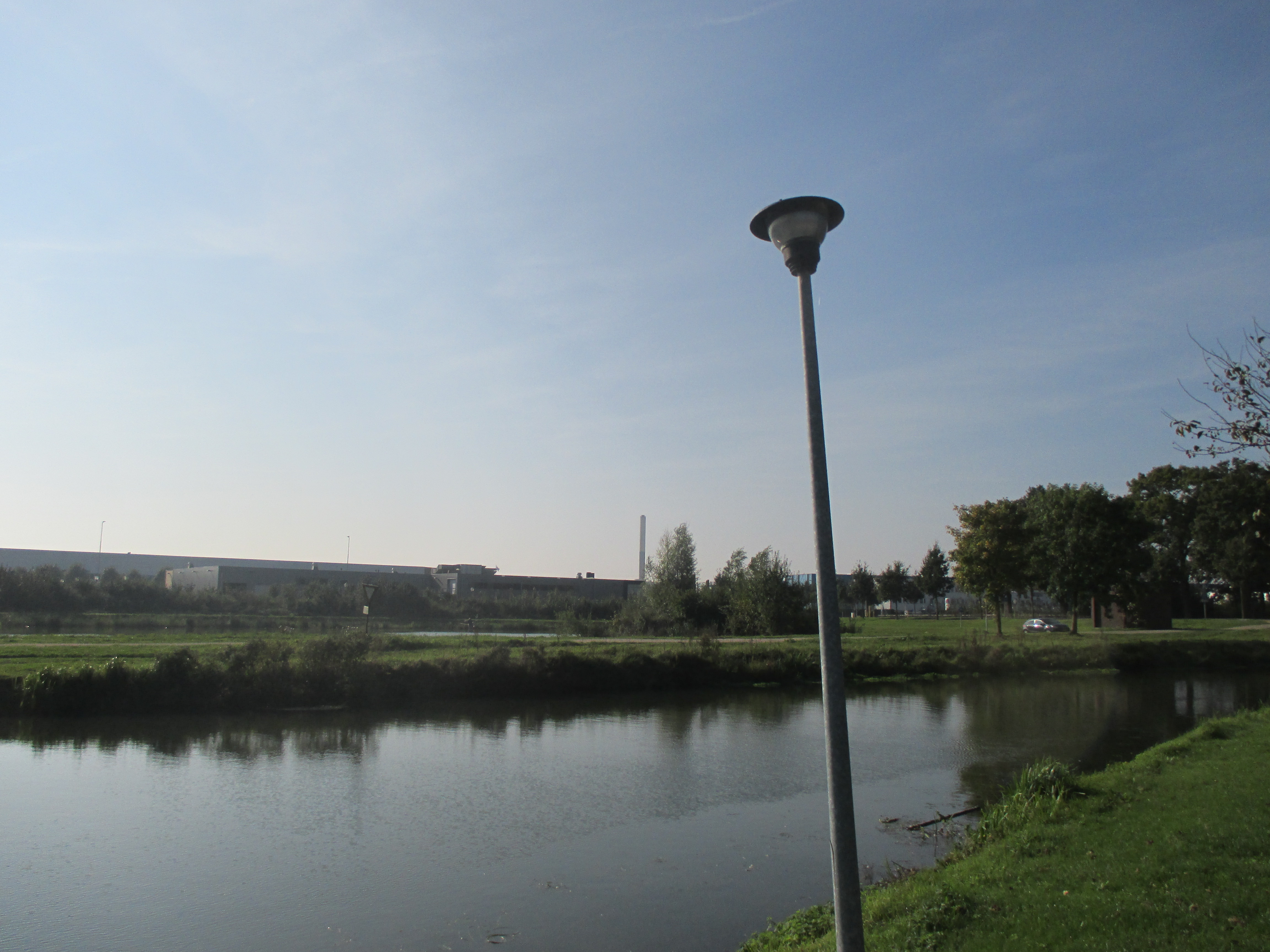 Zicht op het in aanbouw zijnde industrieterrein Medel vanuit het noorden